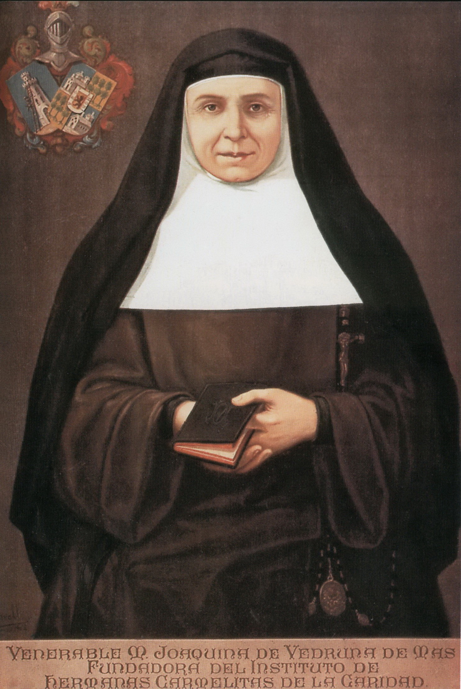 Santa Joaquima de Vedruna. Retrat a l’oli pintat el 1903 per Francesc Morell i Cornet (1845 – 1916), a partir d’una fotografia original retocada. Els drets d’autor ja han prescrit.